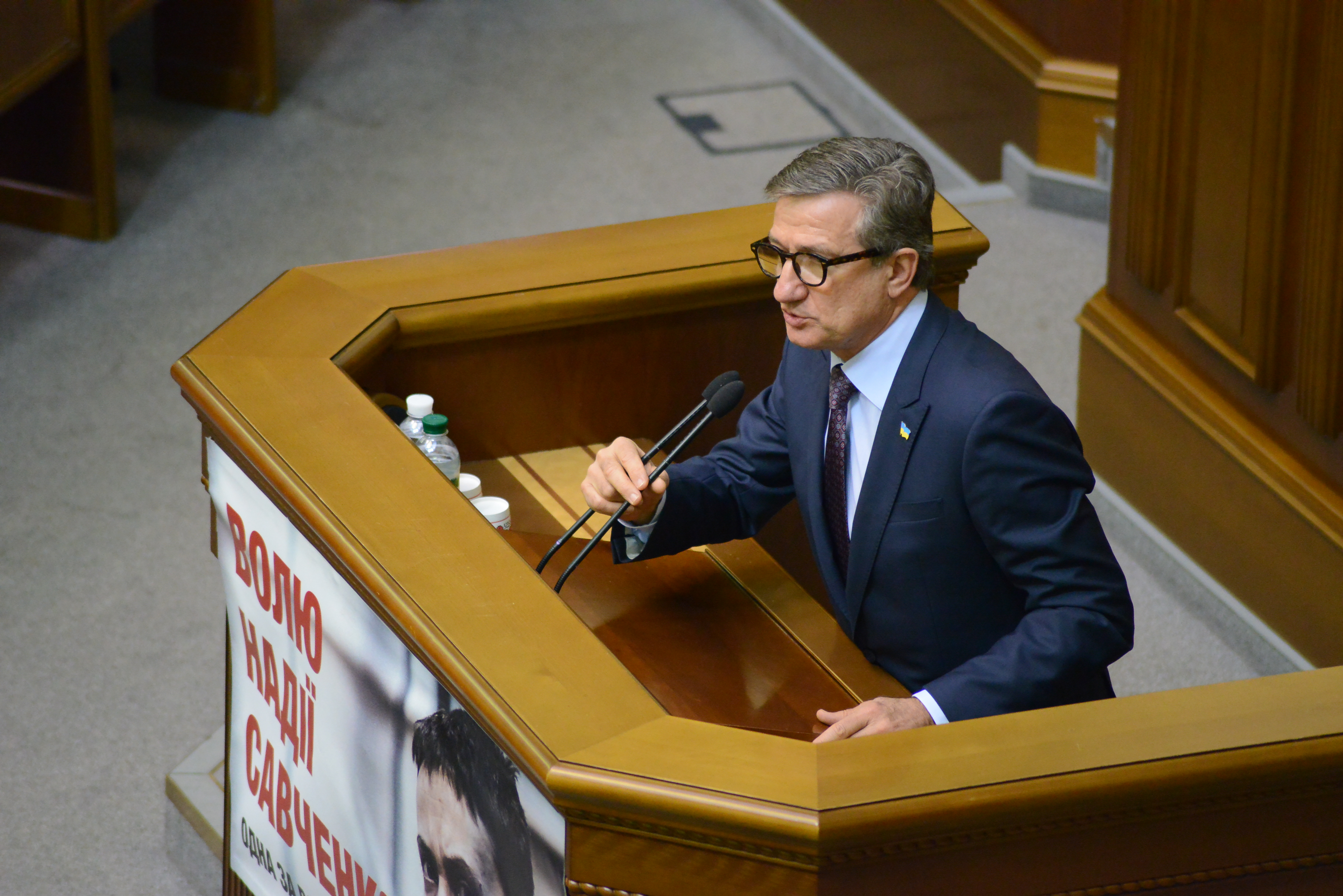 ВЕРХОВНА РАДА УКРАЇНИ 2015 , фото Вадим Чуприна